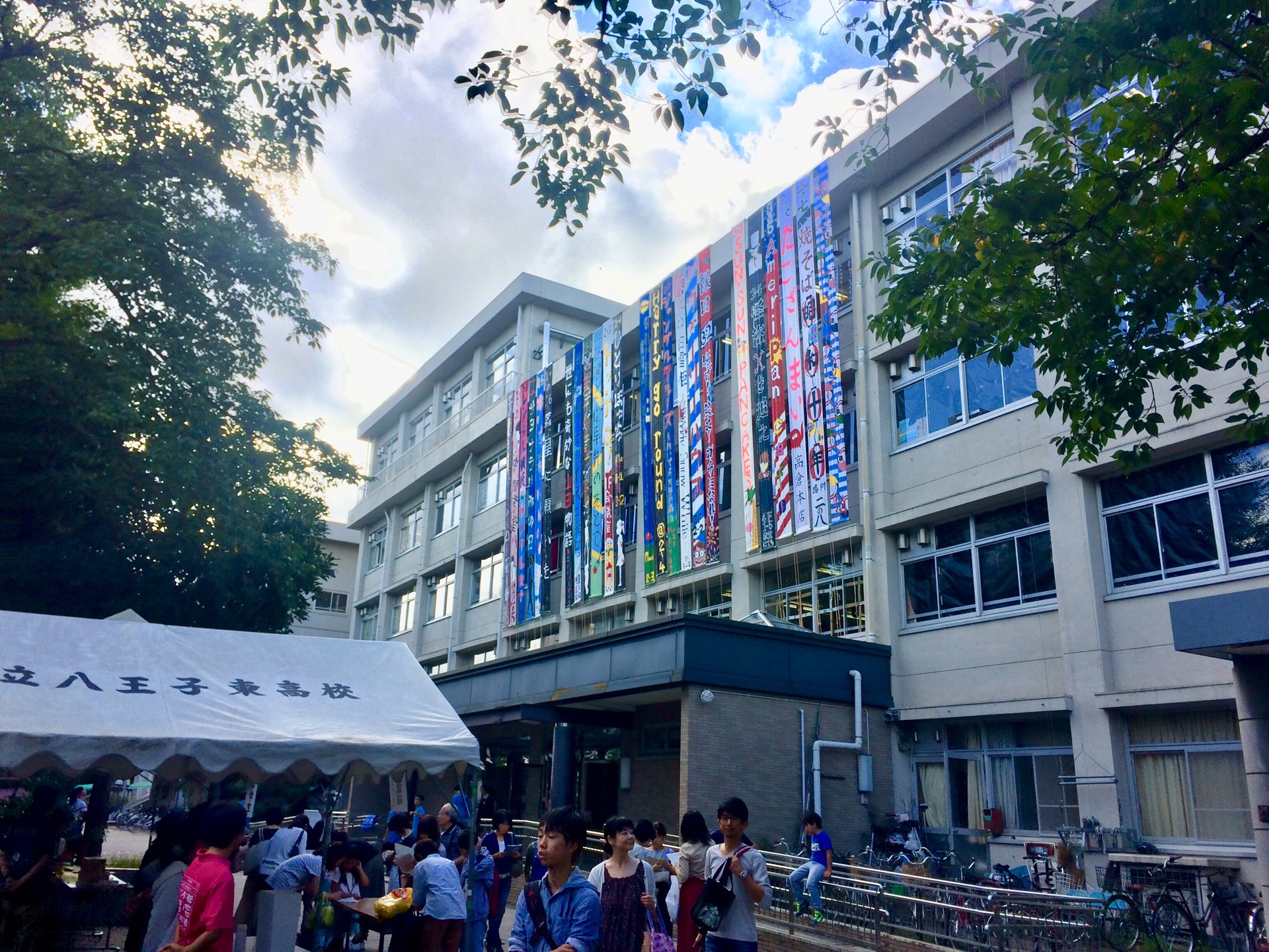 2017年9月2・3日に東京都立八王子東高等学校で開催された文化祭「しらかし祭」の様子です。